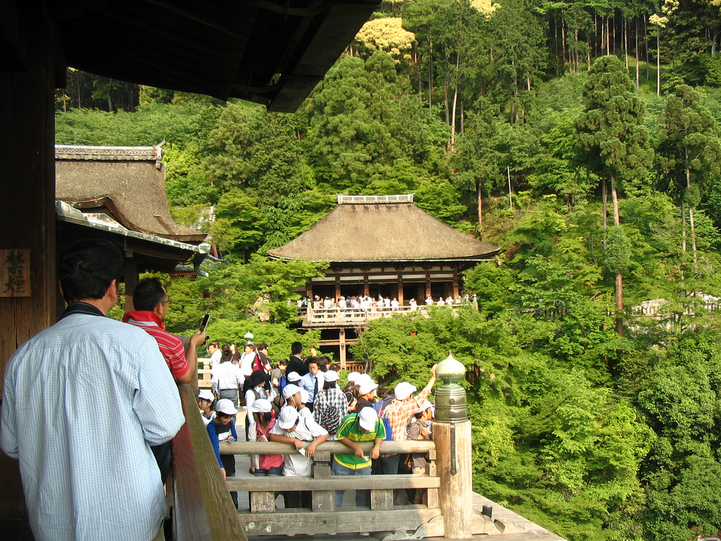 Complexe de temples bouddhiques du Kiyomizu-dera, Kyōto, Japon.